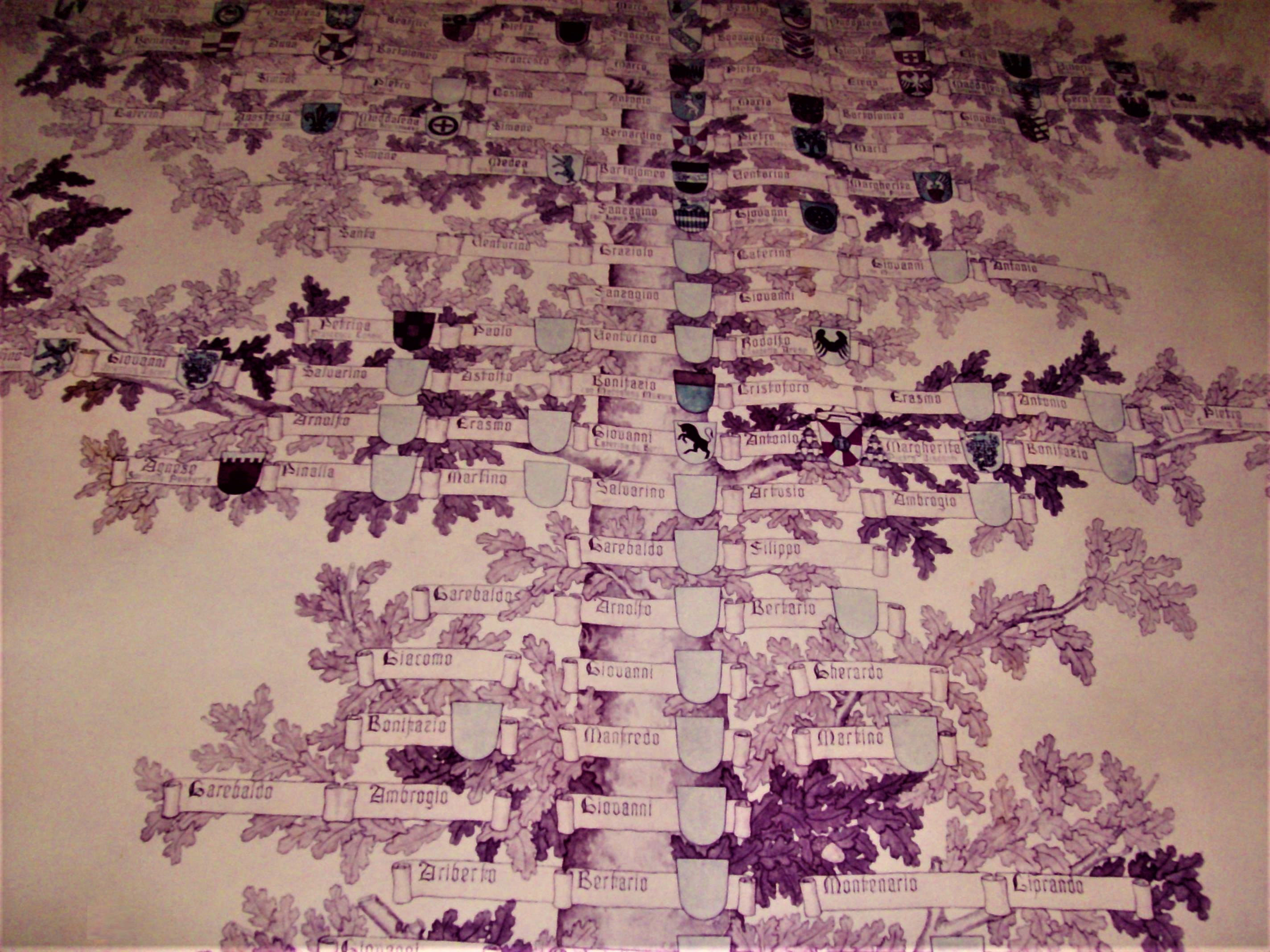 Albero genealogico della famiglia Fanzago degli Aliprandi proveniente dall'abitazione del nobile cavaliere Aliprando Fanzago degli Aliprandi (Padova 8 aprile 1920 - Bassano del Grappa 12 agosto 2007) collezione privata